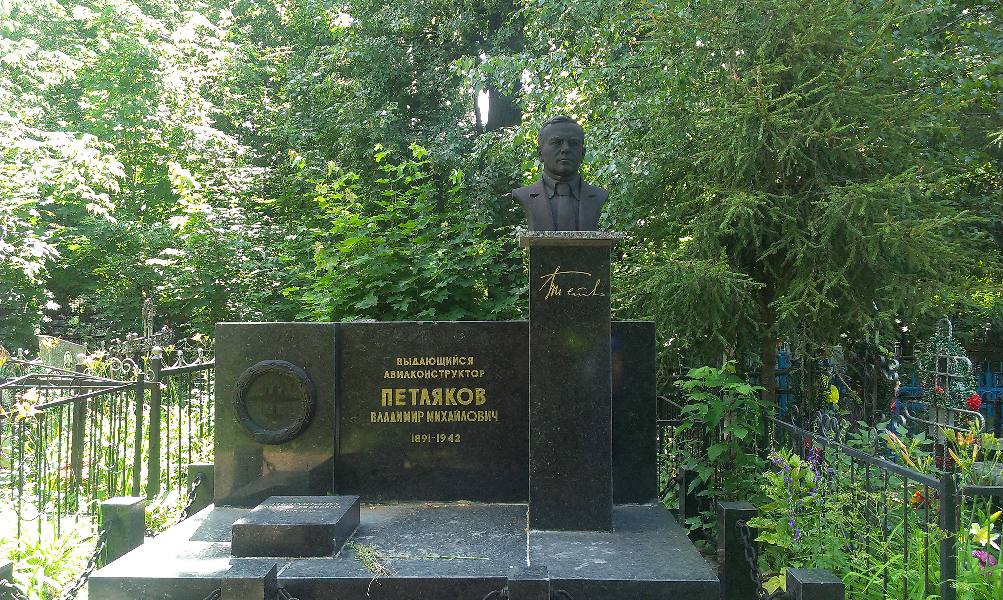 Арское кладбище